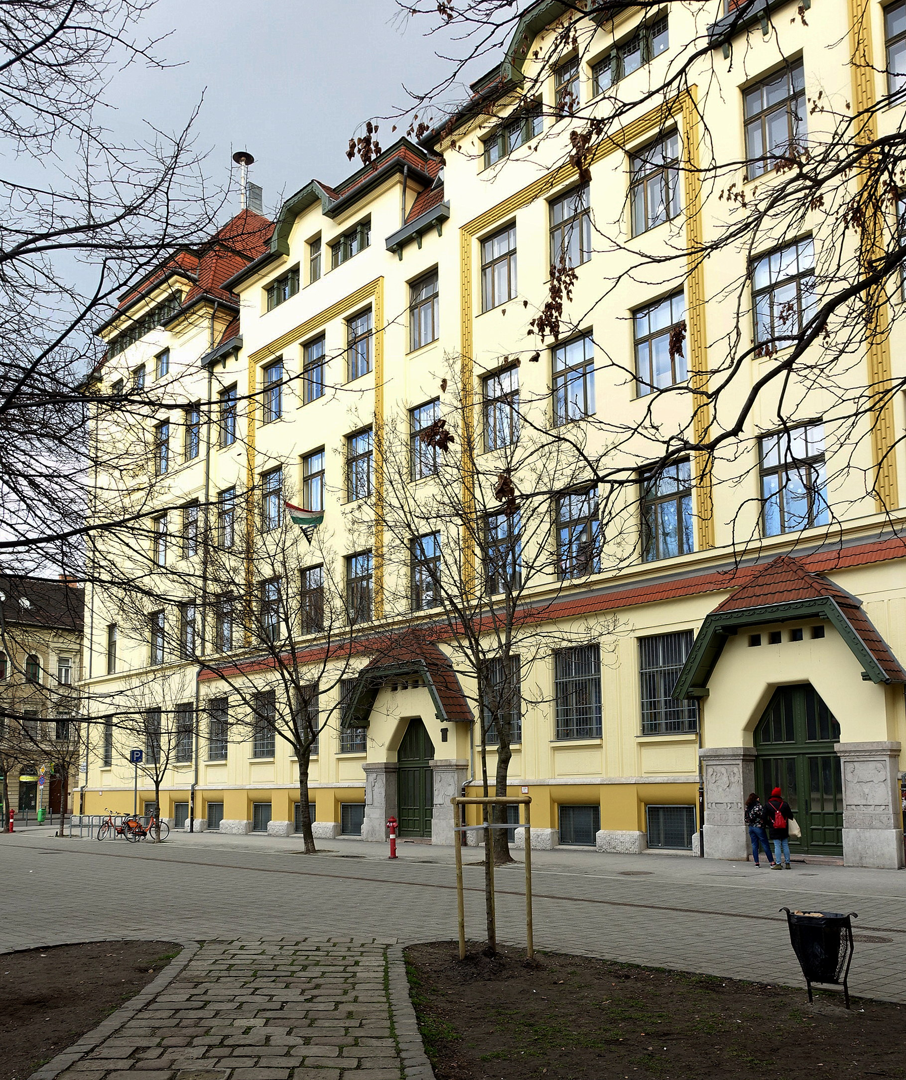 Fazekas Mihály Gimnázium